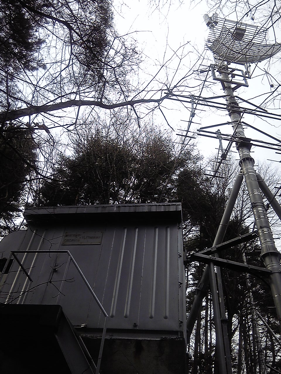 長野県岡谷市に設置されているテレビ放送の中継局（岡谷川岸中継局）のNHK及び信越放送の設備。